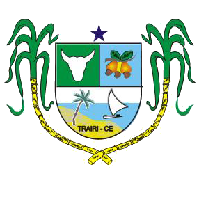 Brasão do município de Trairi